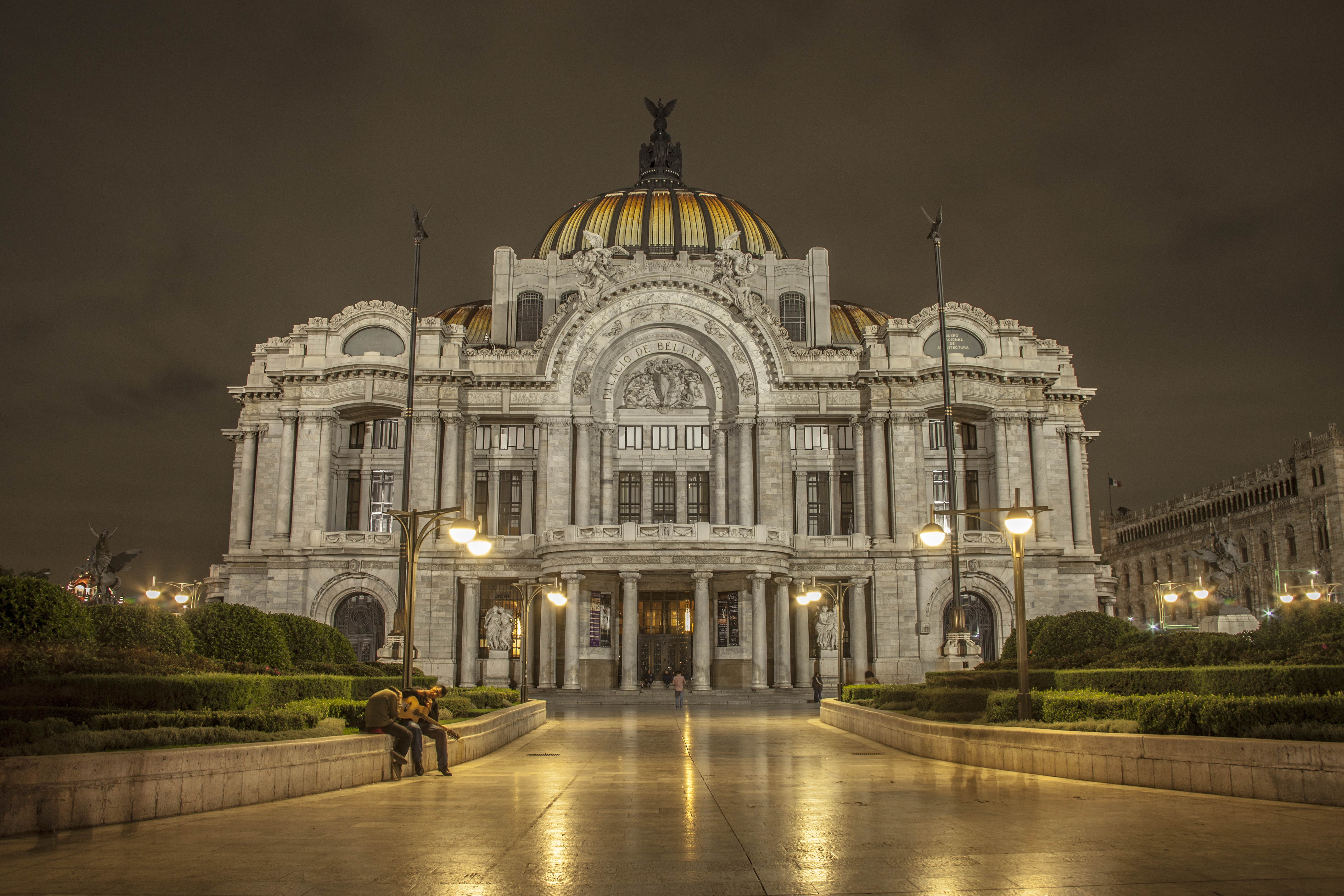 El Palacio de Bellas Artes, ubicado en el Centro Histórico de la Ciudad de México, es la casa máxima de la expresión de la cultura del país, considerado el teatro lírico más relevante de México, y el centro más importante dedicado a las bellas artes en todas sus manifestaciones. La Unesco lo declaró monumento artístico en 1987. Fue encargado por el presidente mexicano Porfirio Díaz al final de su mandato con motivo de la celebración del Centenario del Inicio de la Independencia de México. Depende del Instituto Nacional de Bellas Artes (INBA).